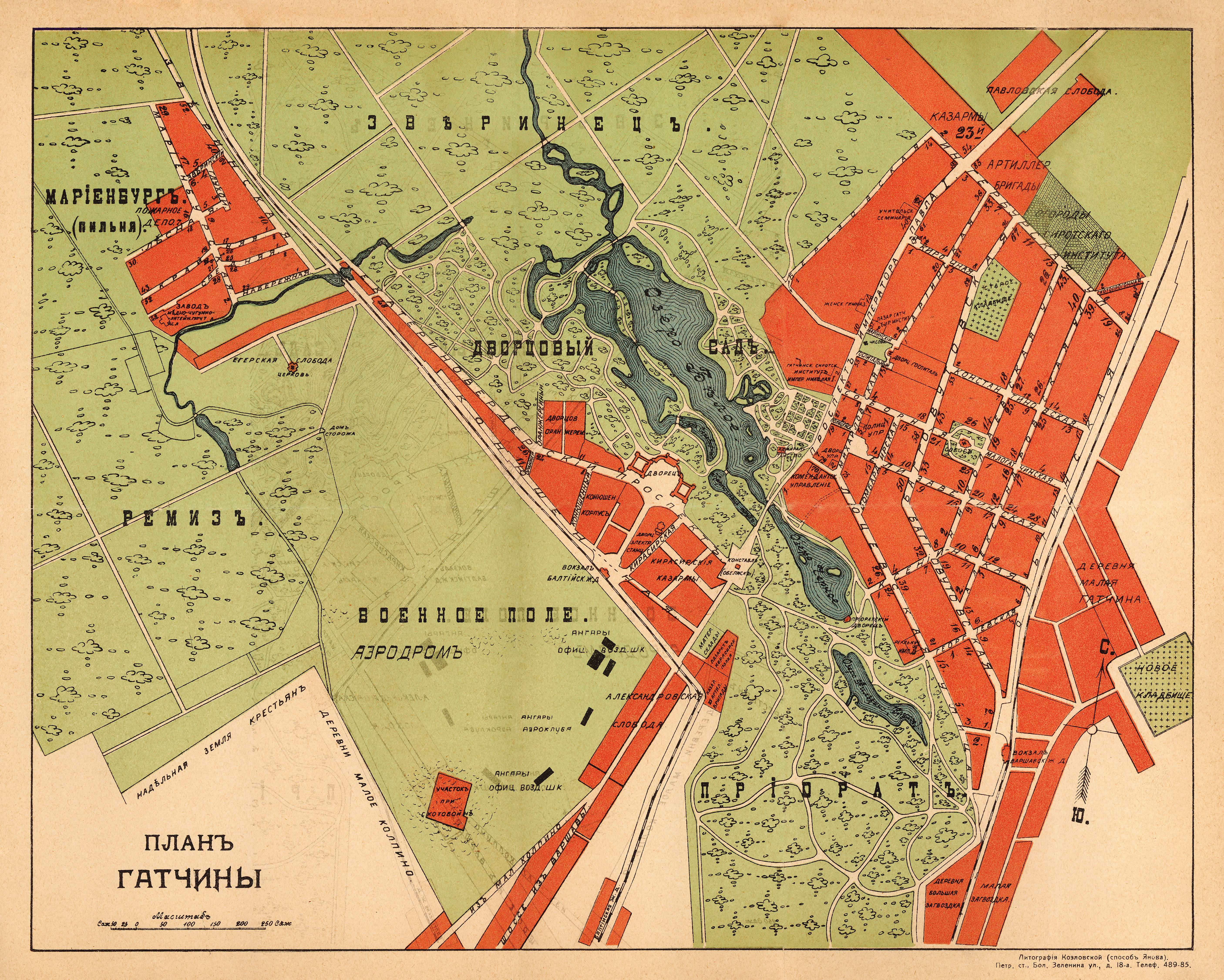 План Гатчины, литография М.В. Козловской, 1915 год.